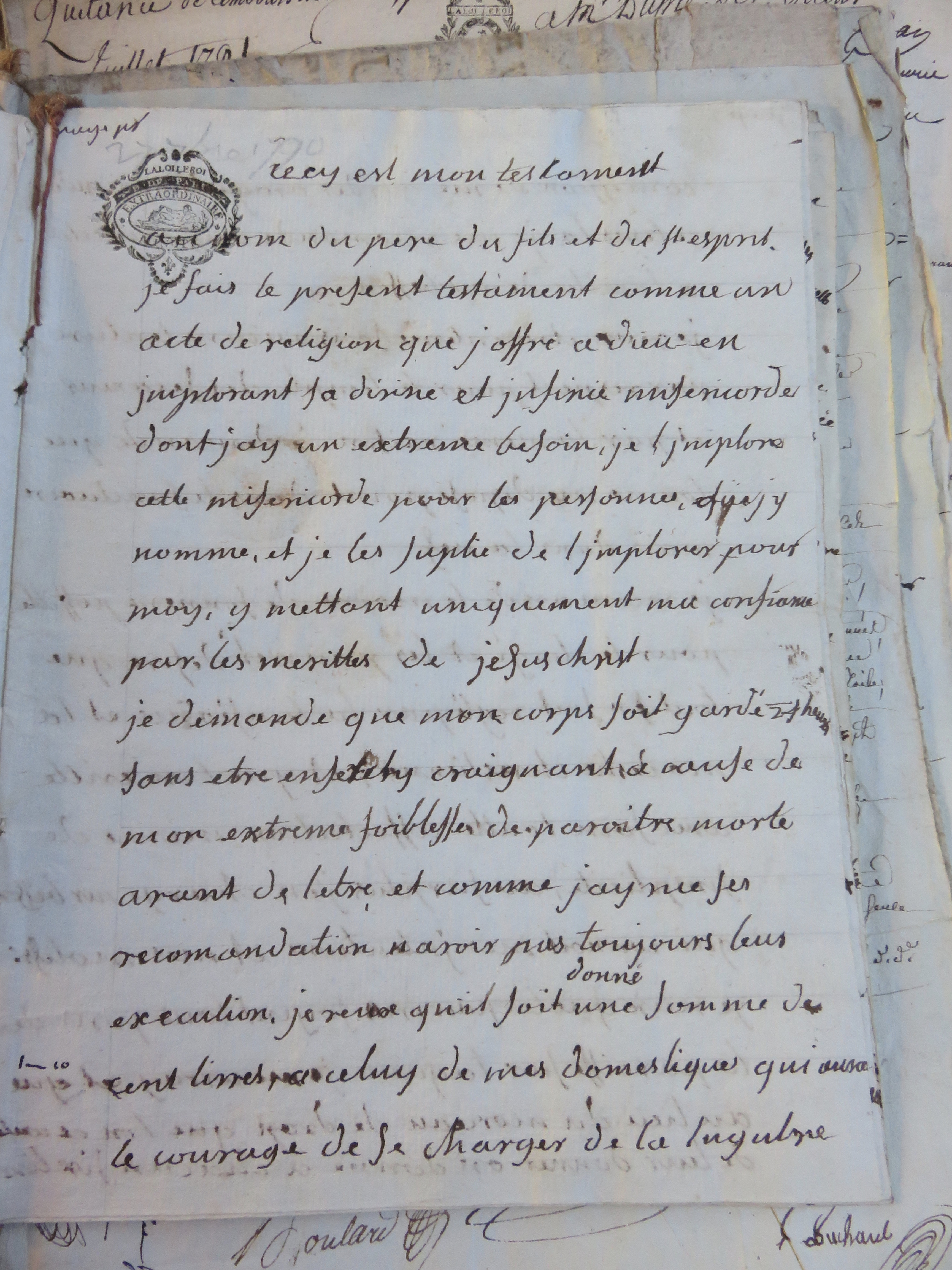 Photo prise par mes soins du testament de Mme de Moras aux archives Nationales